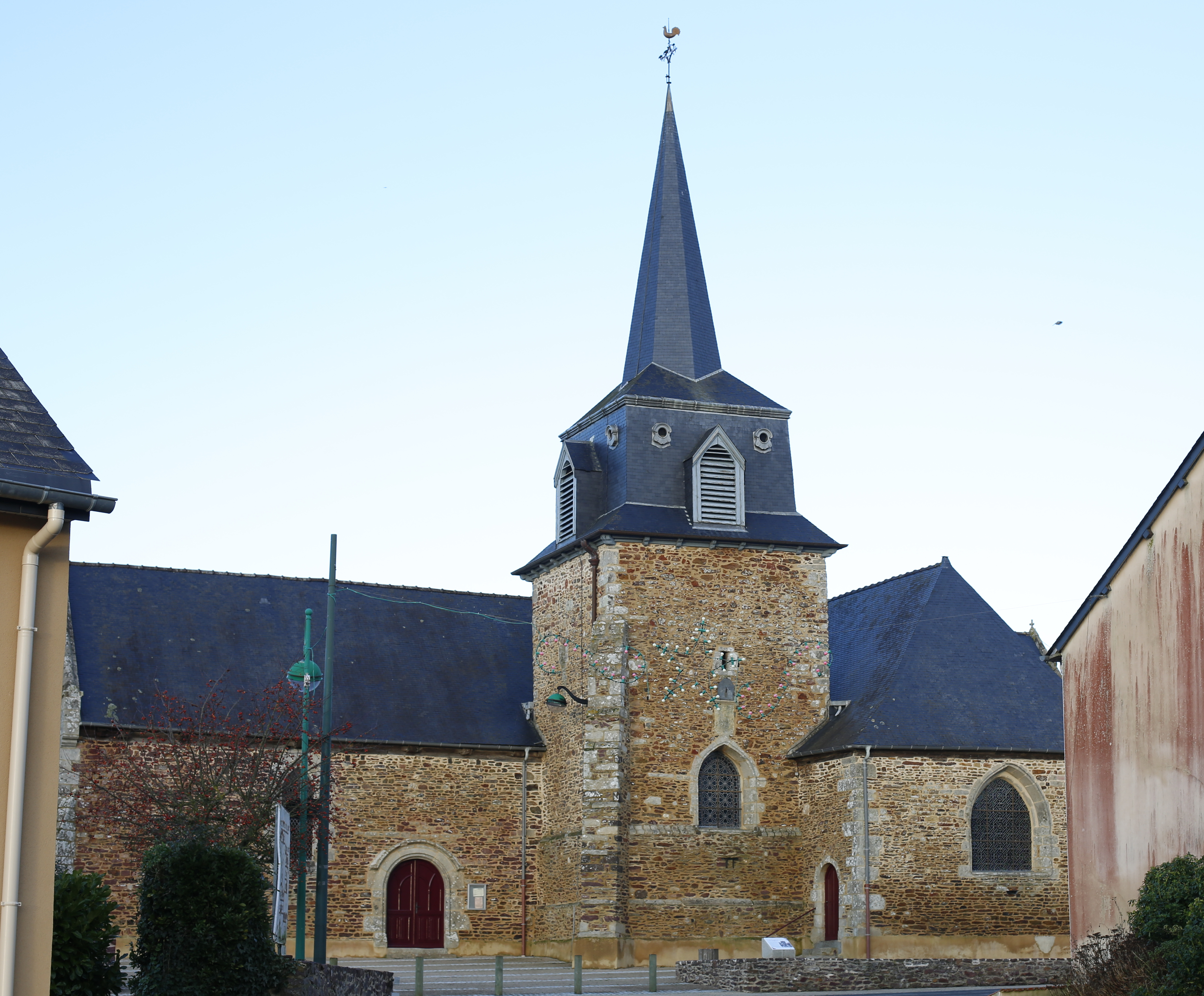 Ancienne église priorale des bénédictins à Saint-Onen-la-Chapelle, actuelle église paroissiale.